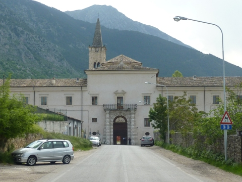 Sulmona: Abbazia di Santo Spirito al Morrone